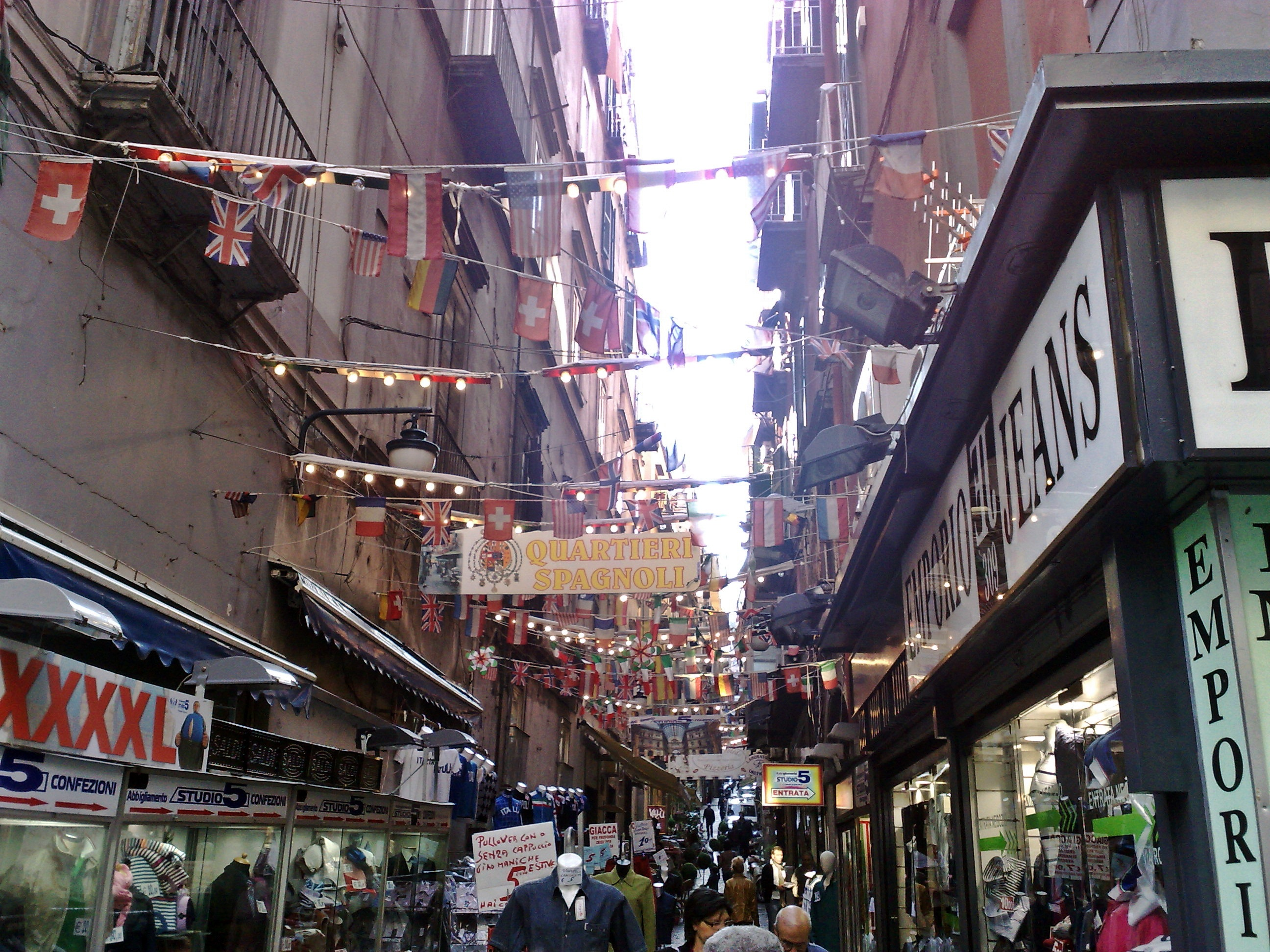 Quartieri Spagnoli da Via Toledo. (Napoli)